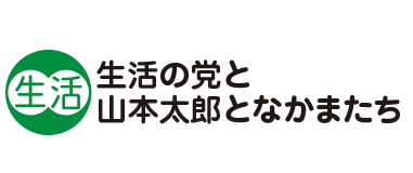 生活の党と山本太郎となかまたち